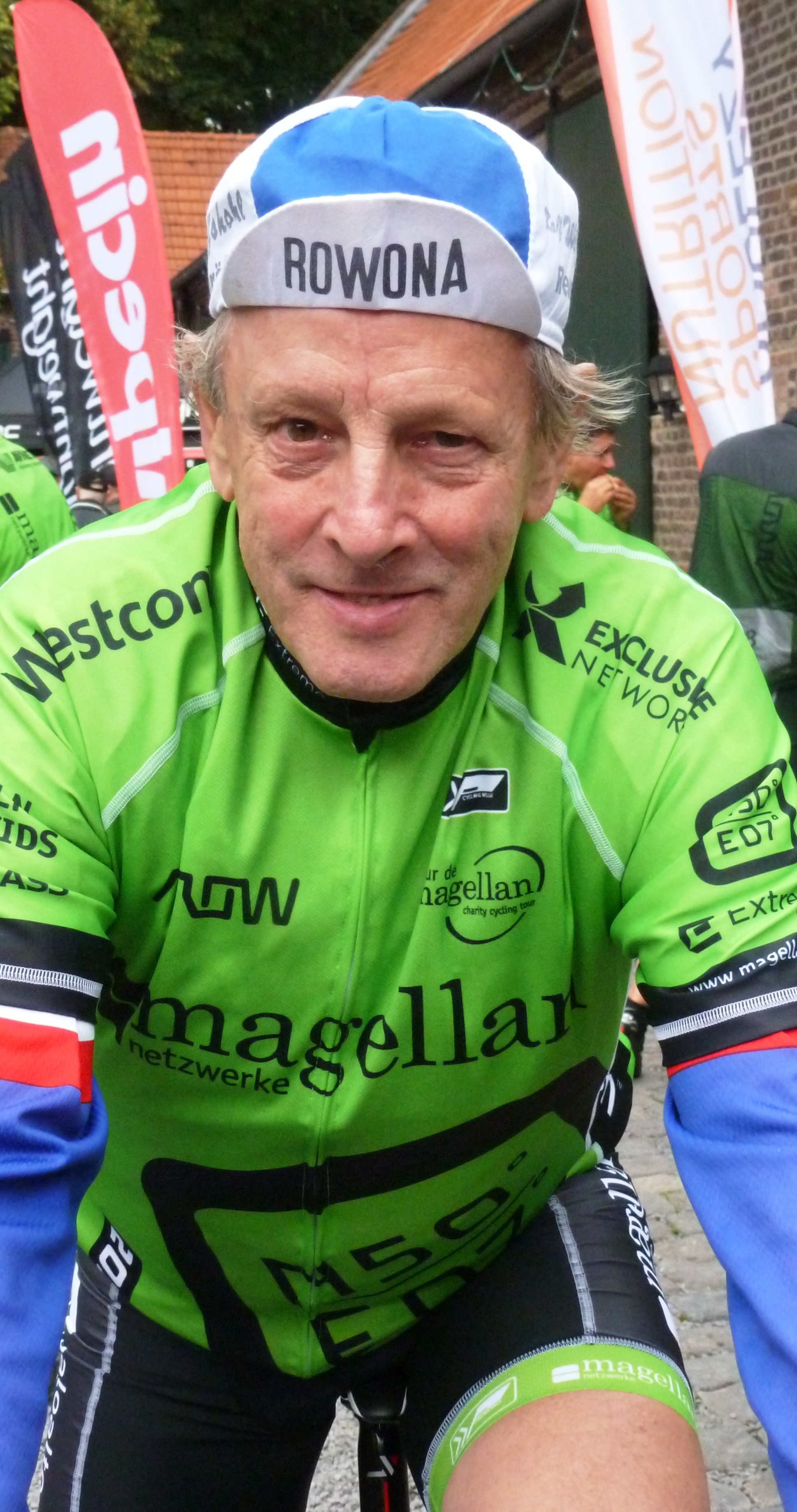 Tour de Magellan 2014, Gut Eltzhof in Köln